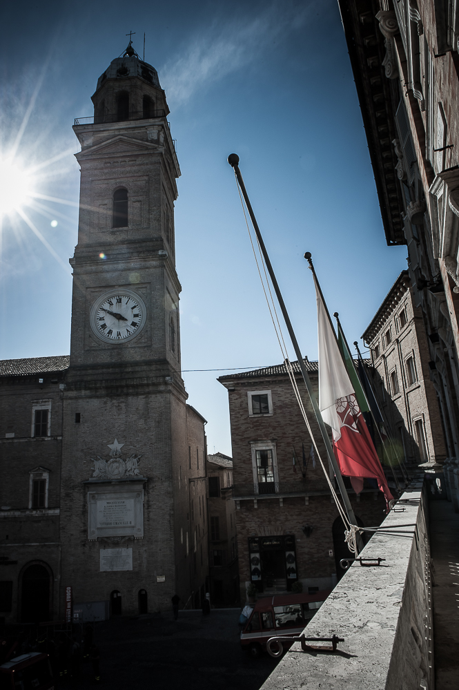 Torre civica di Macerata (Marche) This is a photo of a monument which is part of cultural heritage of Italy.